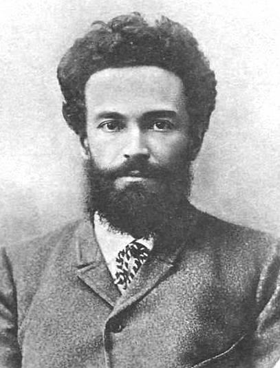 Русский философ Николай Яковлевич Грот